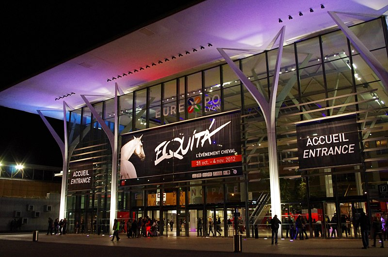 Entrée d'Eurexpo durant le salon Equita'Lyon (30 octobre - 4 novembre 2012)